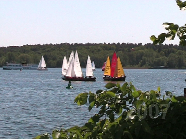 Rennkutter auf der Müritz Sail in Waren (Müritz)